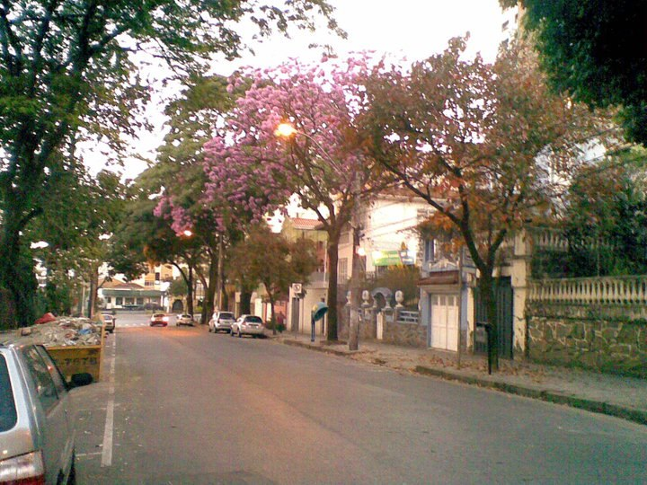 Vista da Rua Marechal Deodoro, Bairro Floresta, Belo Horizonte, em época de Ipês [Savassi, Leonardo]